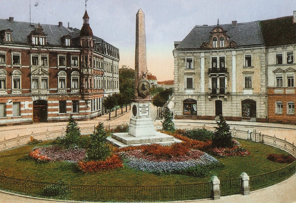 Erlangen. Das Kaiser-Wilhelm-Denkmal auf dem Kaiser-Wilhelm-Platz (seit 1945 Lorlebergplatz). 1942 wurden die Medaillons (Entwurf: Heinrich Schwabe, Guss: Gabriel Hörner) entfernt, 1946 wurde der Obelisk abgerissen.